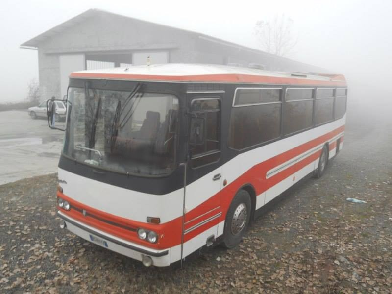 Fiat 343 Dallavia del 1975 n.ro 002 preservato da Storicbus-Museo dell'Autobus Italiano